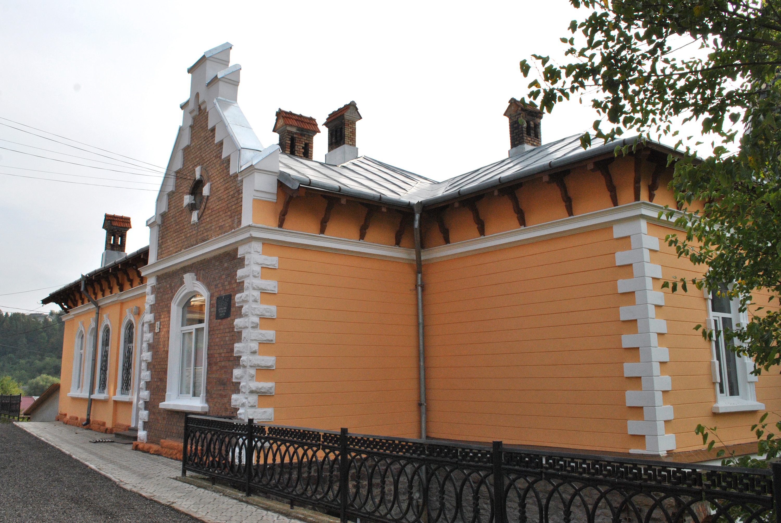 Житловий будинок (мур.), нині — Бучацька музична школа, Бучач, вул. Шевченка, 9.